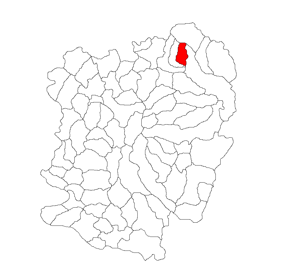 Categorie:Hărţi ale judeţului Caraş-Severin